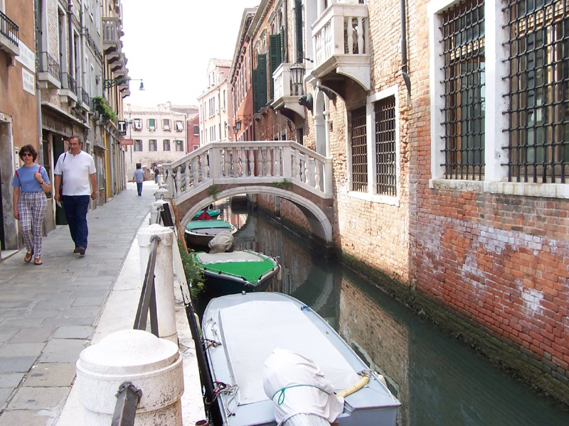 Venezia - Rio presso l'Arsenale